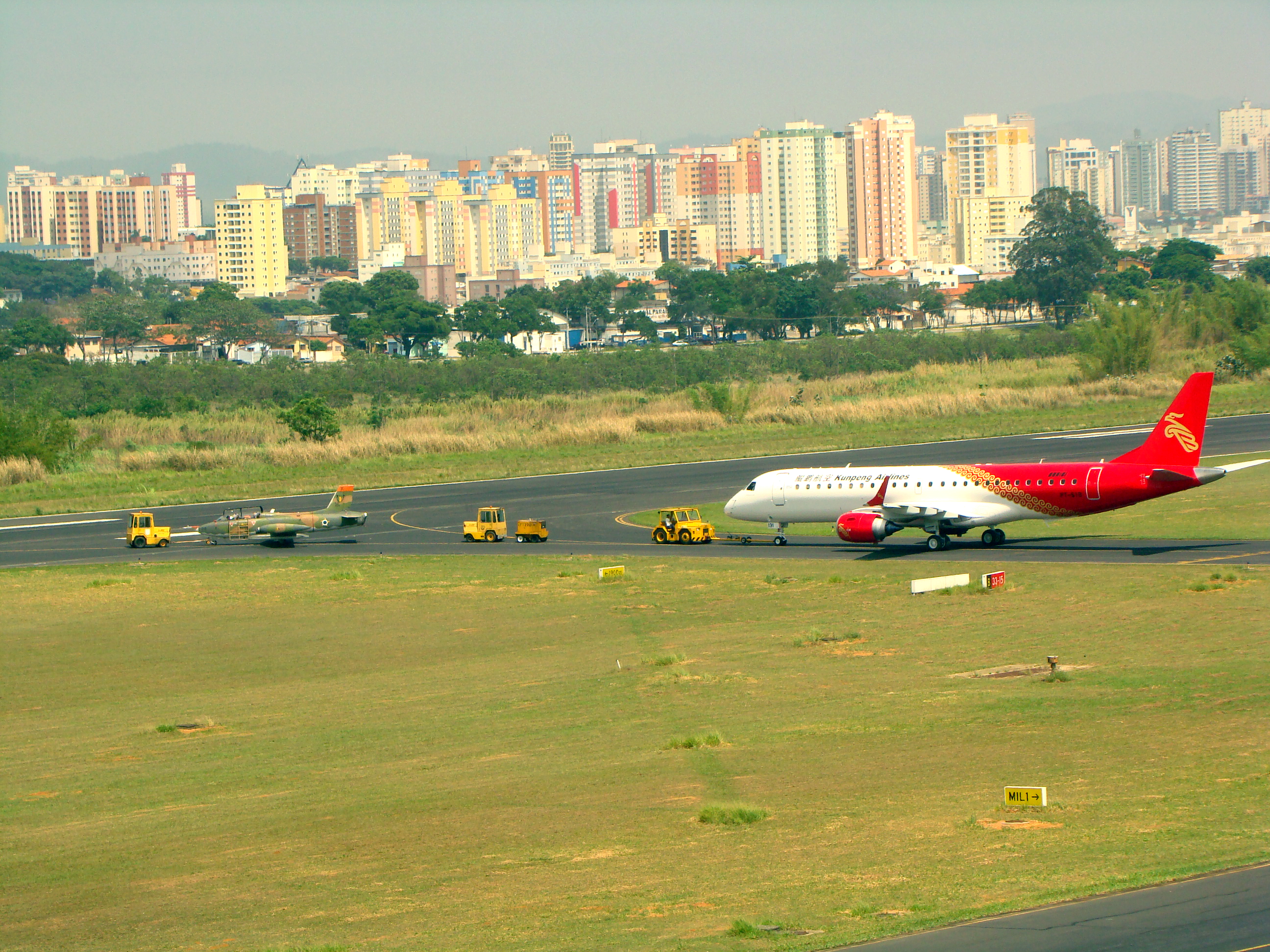 aeroporto de são jose dos campos com a cidade ao fundo